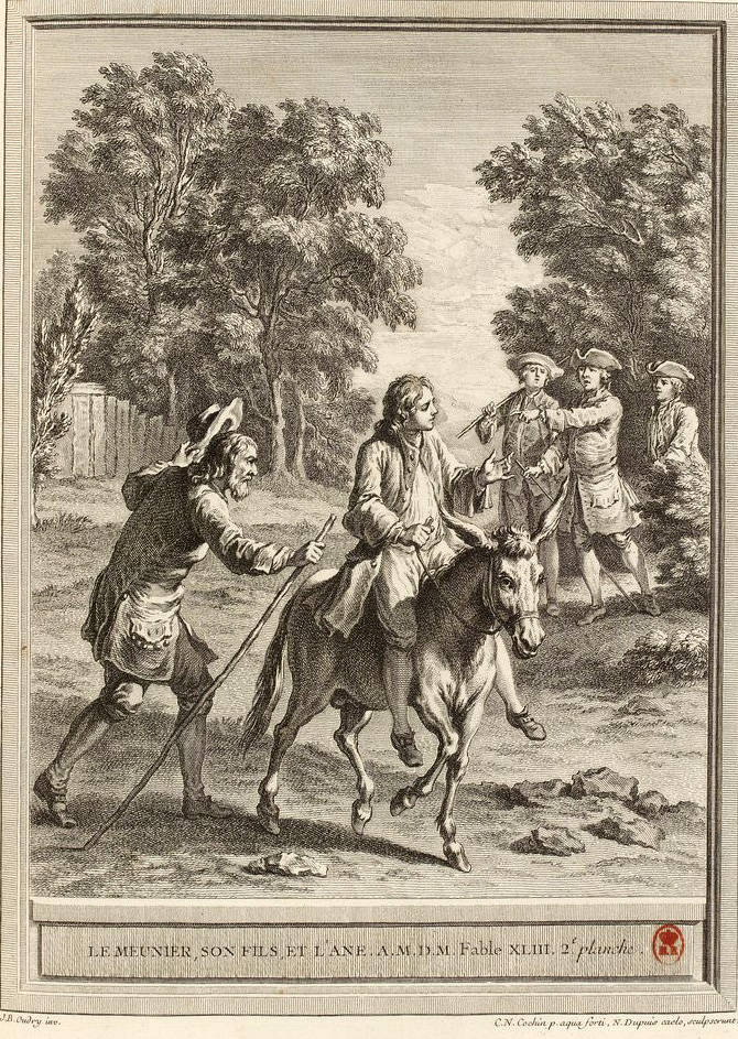 Gravure réalisée par Nicolas-Gabriel Dupuis et Charles-Nicolas Cochin (II) d'après un dessin de Jean-Baptiste Oudry représentant la fable Le meunier, son fils et l'âne de Jean de La Fontaine (fable 1 du livre III). Cette gravure est parue dans l'édition complète des fables de La Fontaine, parue en quatre tomes chez l'éditeur Desaint & Saillant, rue saint Jean de Beauvais à Paris, 1755-1759.